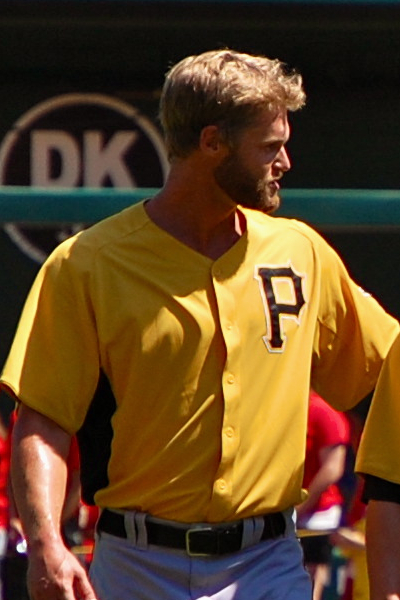 Chris Leroux